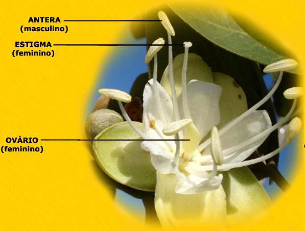 Flor do jatobá-do-cerrado